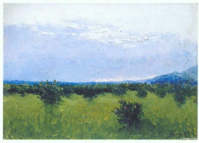 З ваколіц Пяцігорска